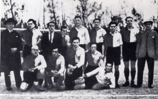 Calciatori della Fiorentina nel 1927-28 con la sua prima maglietta.